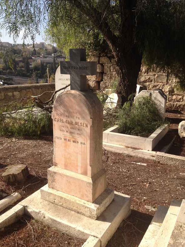 Pastor Carl Christian Olsen (5. April 1815-18. April 1892) aus Norwegen gebürtig; Zionsfriedhof Jerusalem. Er war ehemals Pastor zu Nore im Mumedal.